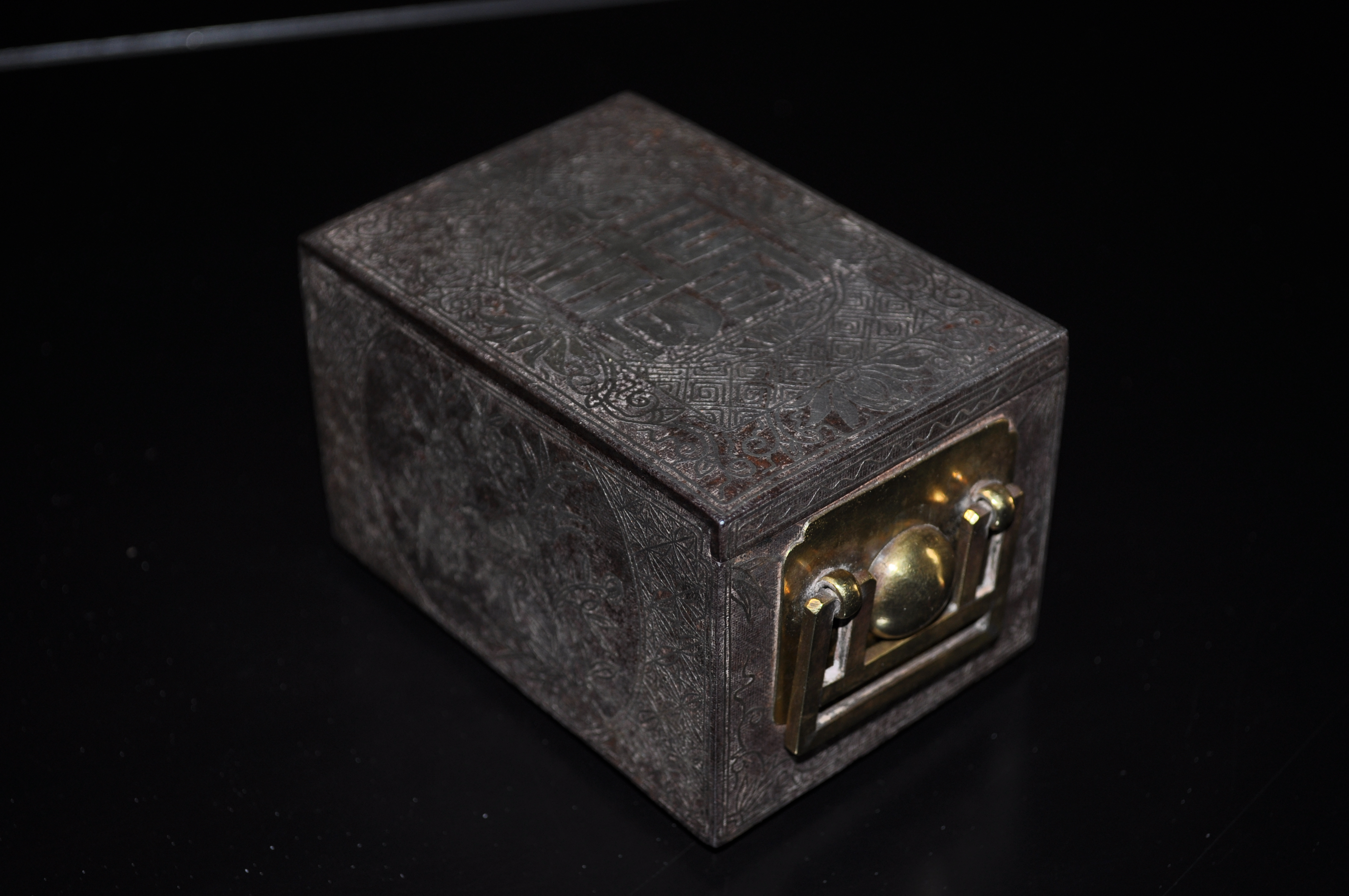 Une boite à secret